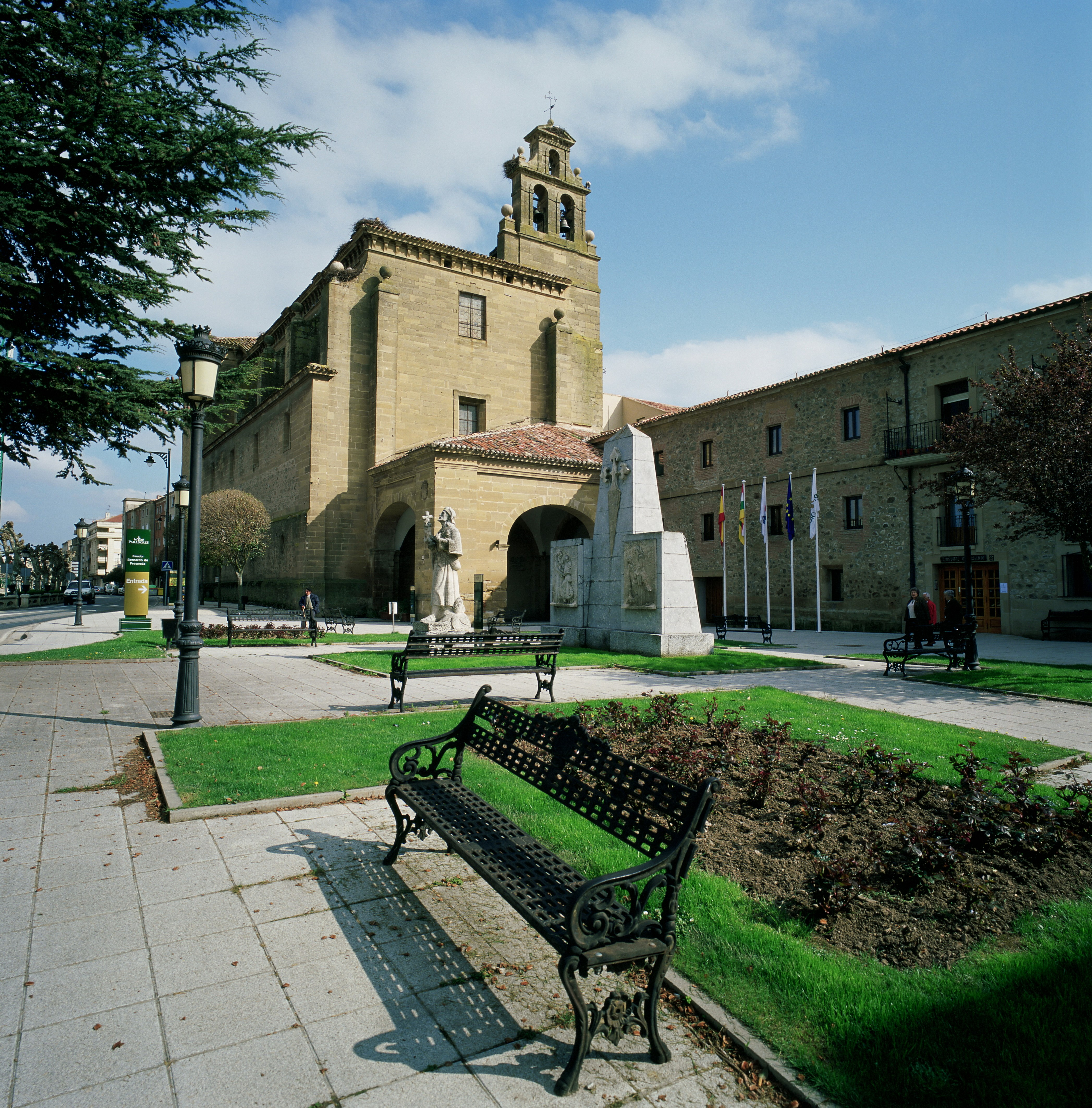 Parador Santo Domingo de la Calzada Bernardo de Fresneda